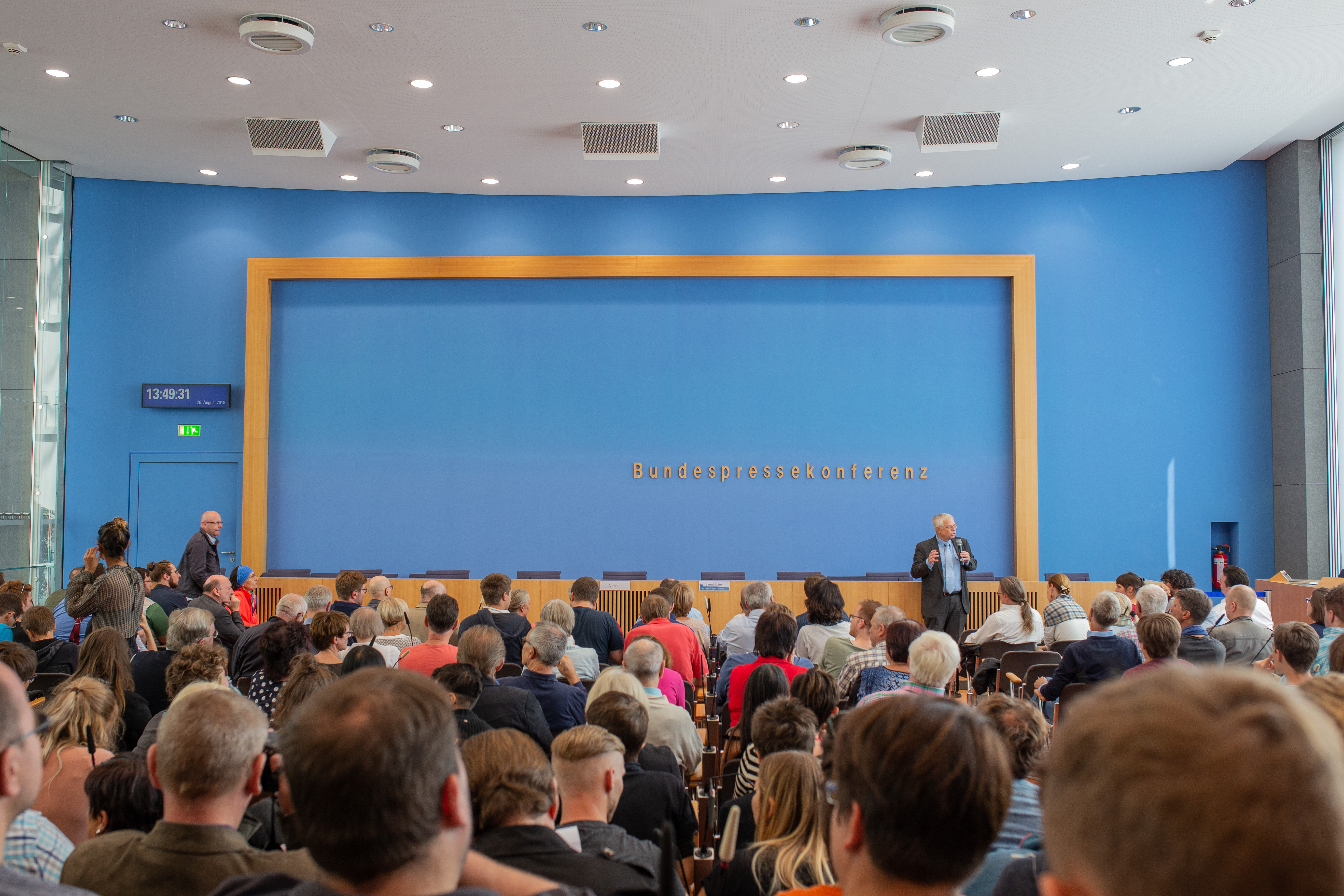 Bundespressekonferenz zum Tag der offenen Tür der Bundesregierung am 26. August 2018.